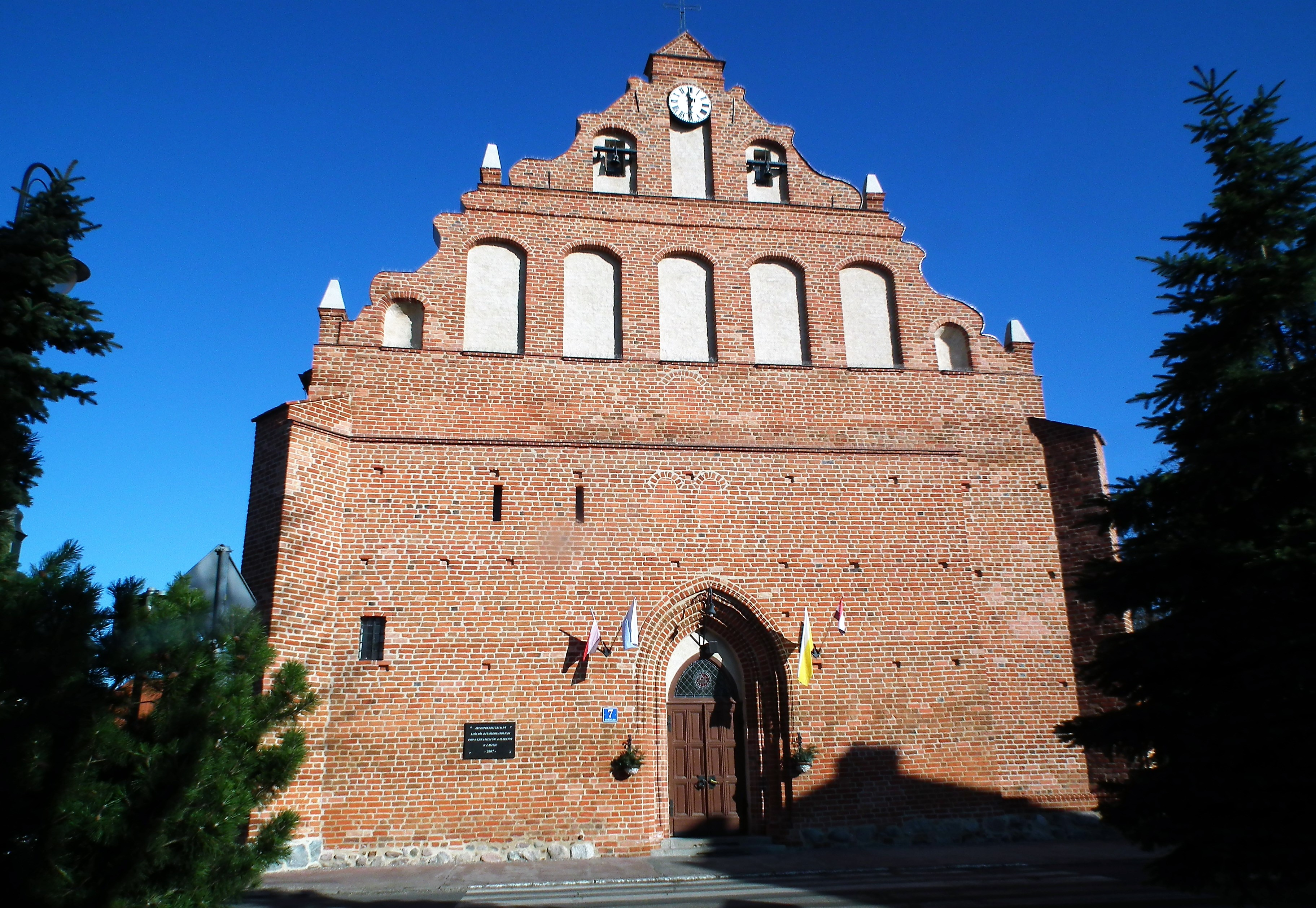 Widok miejski z Łasina. Kościół ś. Katarzyny Aleksandryjskiej.